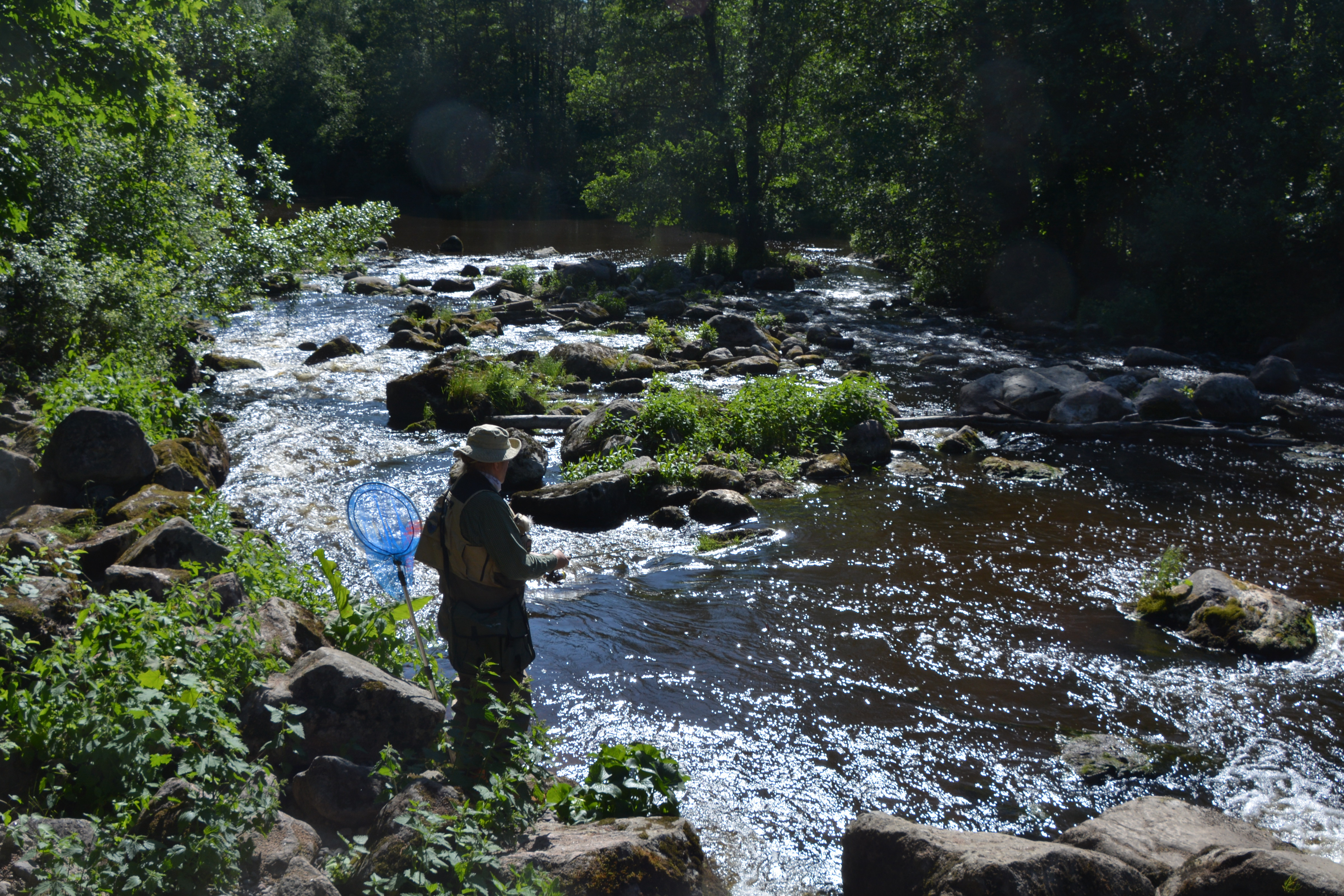 Nukariforsen i Vanda å, Nukari, Nurmijärvi